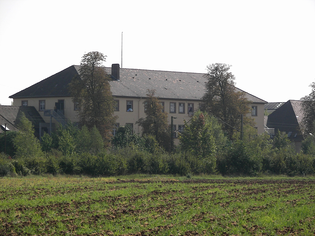 Ehemaliges Verwaltungsgebäude des Ausbesserungswerks Schwetzingen